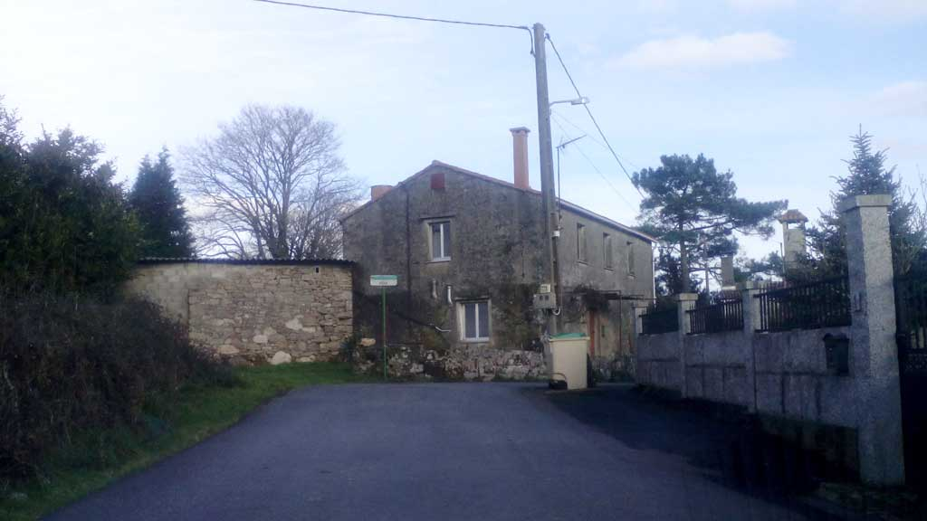 A Pena de Martín, Rodeiro.